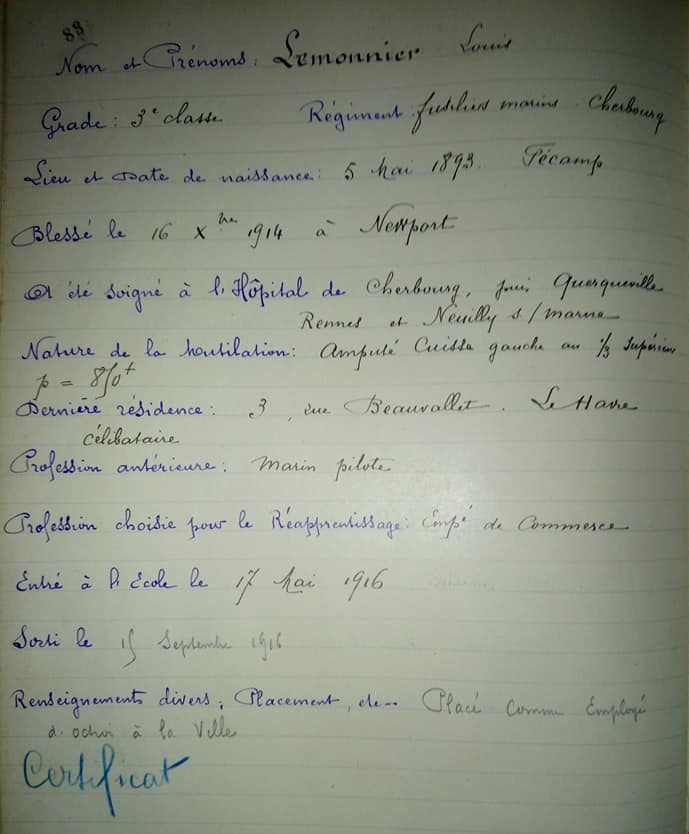 exemple de fiche de rééducation professionnelle d'un mutilé de guerre de 14-18